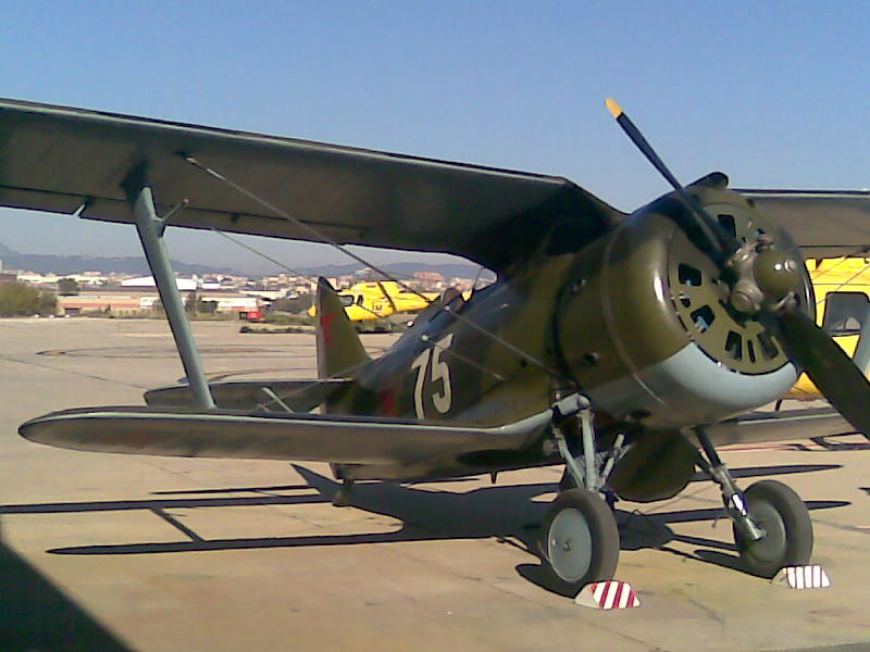 Avión propiedad de la FPAC